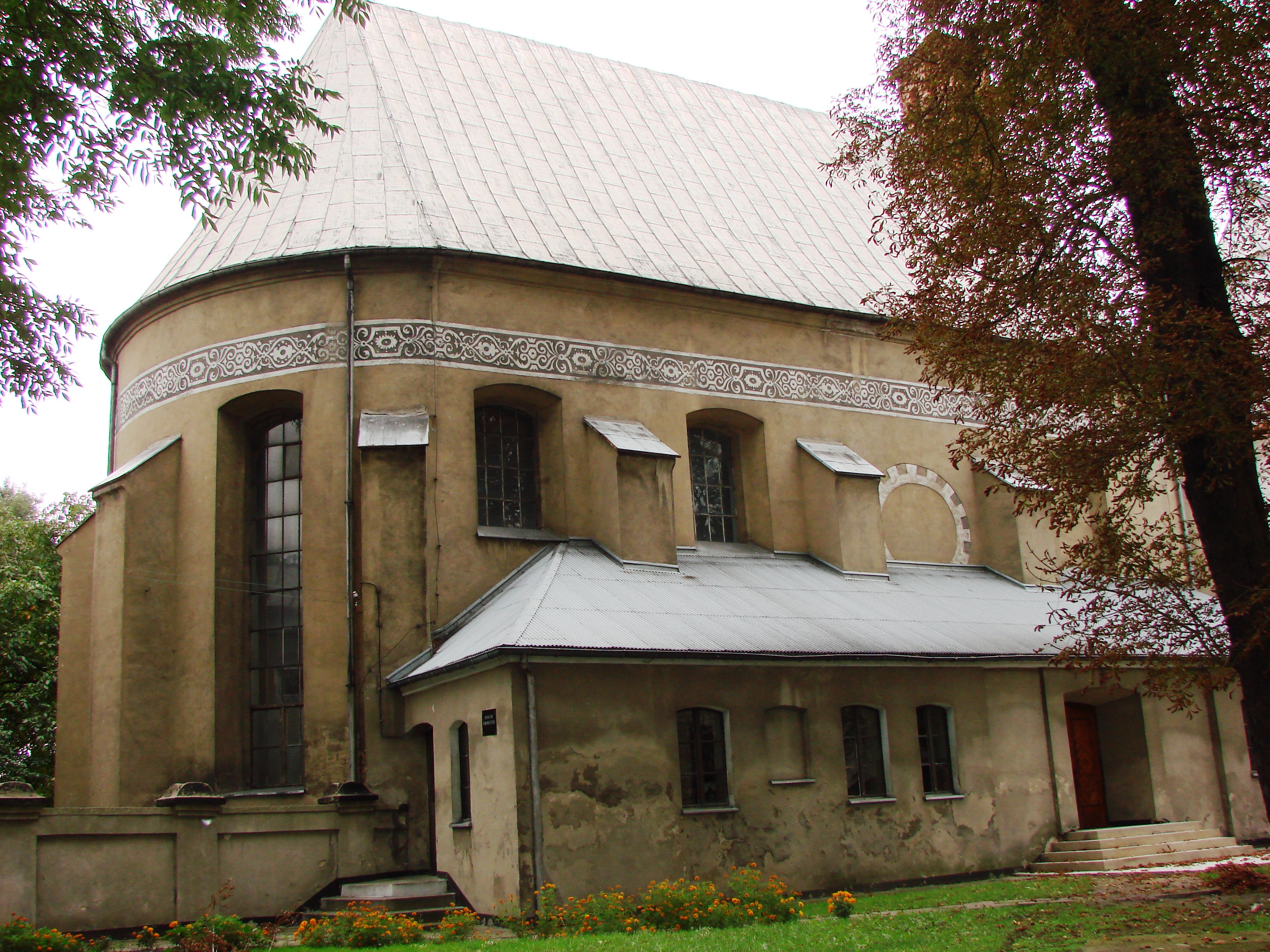 Wieluń - kościół ewangelicko-augsburski